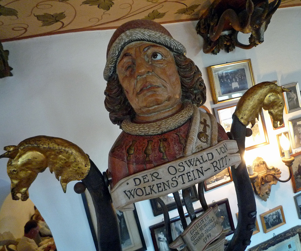 Oswald-von-Wolkenstein-Wander-Trophäe (für Sieger des Oswald von Wolkenstein-Rittes in Südtirol)